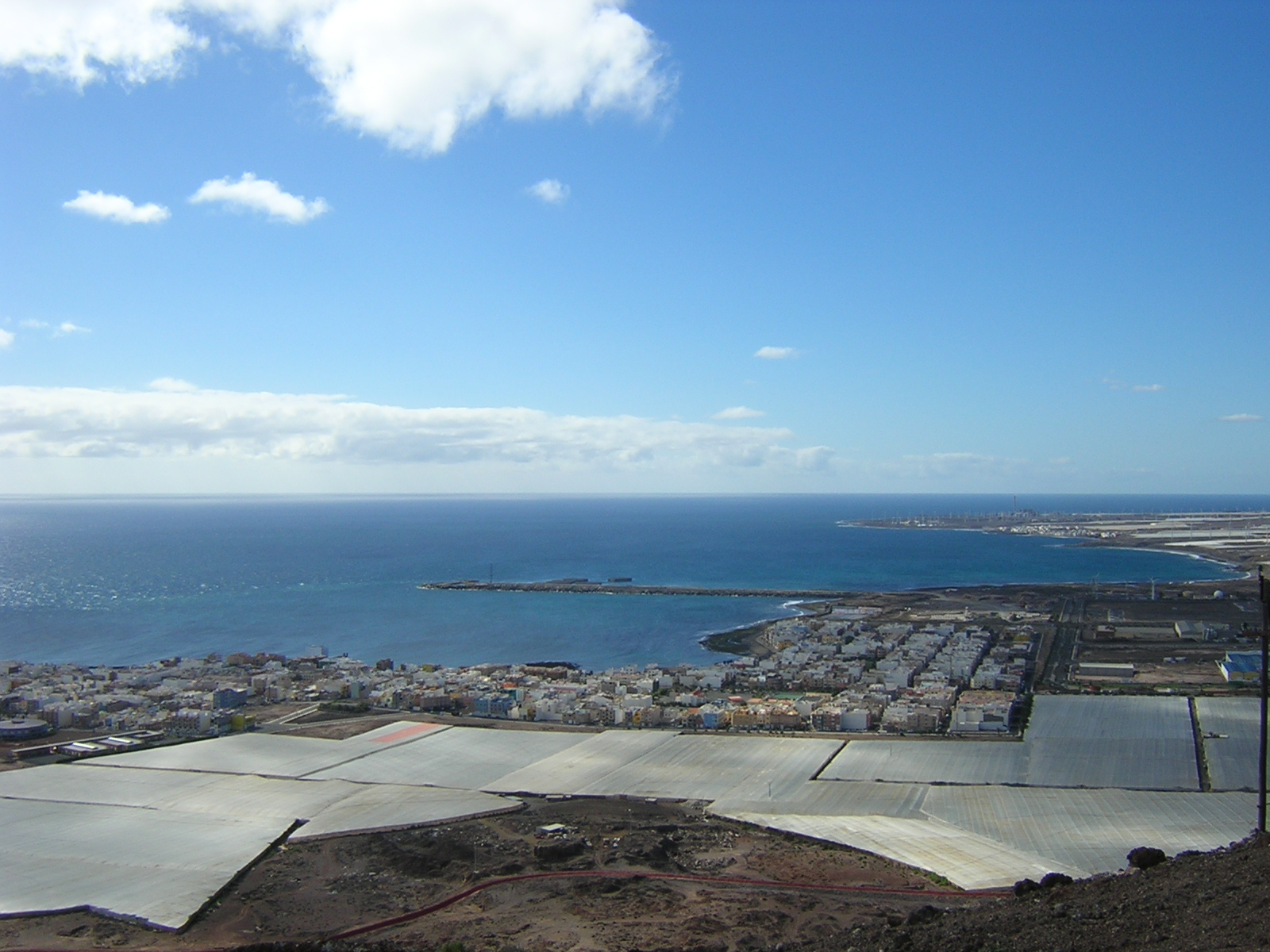 Arinaga_01